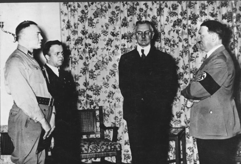 Hjalmar Schacht, Adolf Hitler ADN-Zentralbild/ Archiv Unterredung des Reichskanzlers Adolf Hitler mit dem Reichswirtschaftsminister und Reichsbankpräsidenten Dr. Hjalmar Schacht 1936 über die wirtschaftliche Lage Abgebildete Personen: Hitler, Adolf: Reichskanzler, Deutschland Schacht, Hjalmar Dr.: Reichswirtschaftsminister, Reichsbankpräsident, Nürnberger Prozeß, Deutschland (GND 118606026)